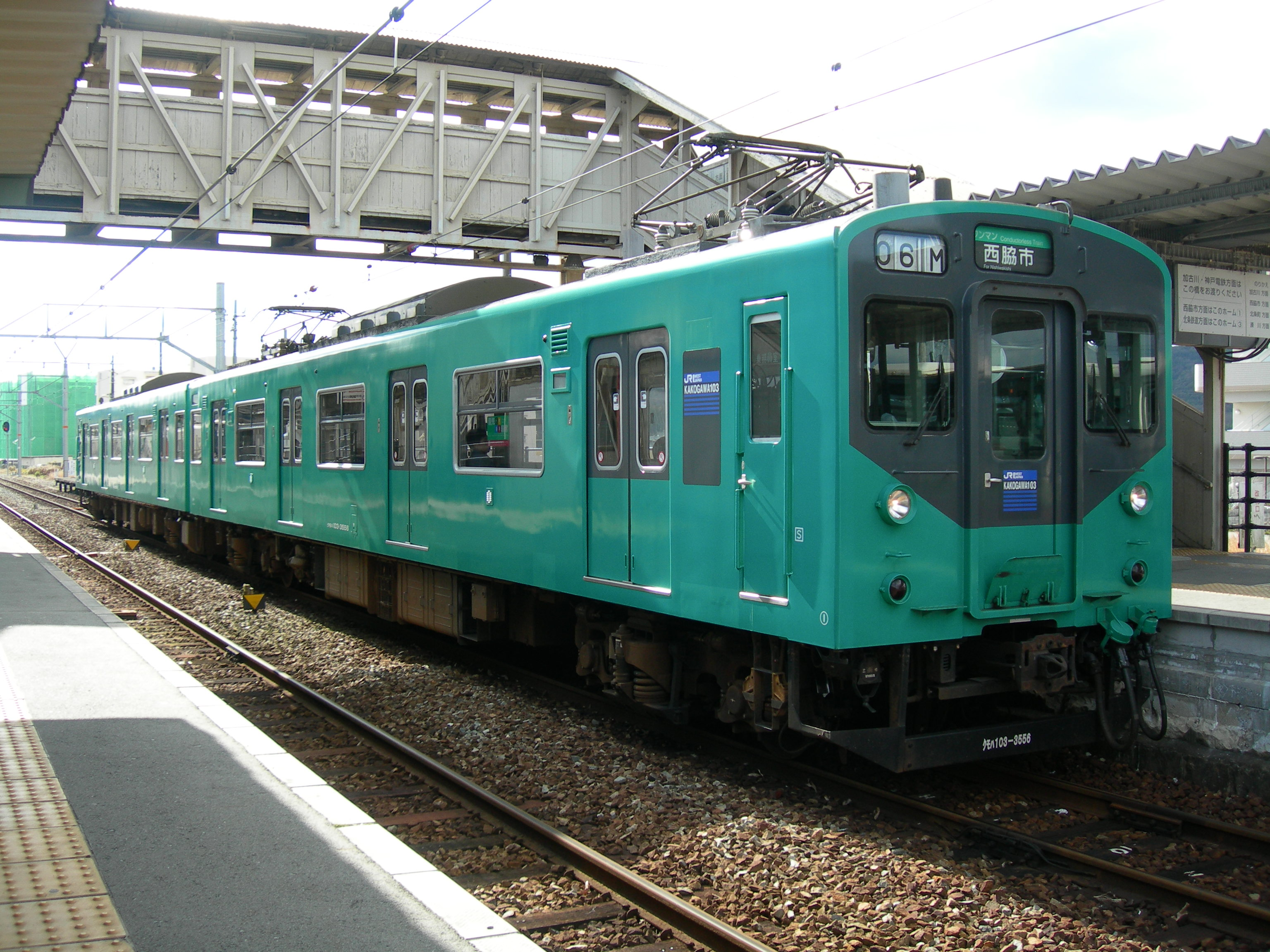 JR西日本103系電車